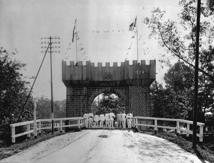 Foto. Ter herinnering aan het bezoek van Zijne Excellentie den Gouverneur-Generaal van Nederlandsch-Indië Mr. D. Fock aan de residentie Zuider- en Oosterafdeeling van Borneo (April 1924). Het bezoek van de Gouverneur-Generaal mr. Dirk Fock aan Bandjermasin, tijdens zijn rondreis door de Zuider- en Oosterafdeling van Borneo, 1924-04-00